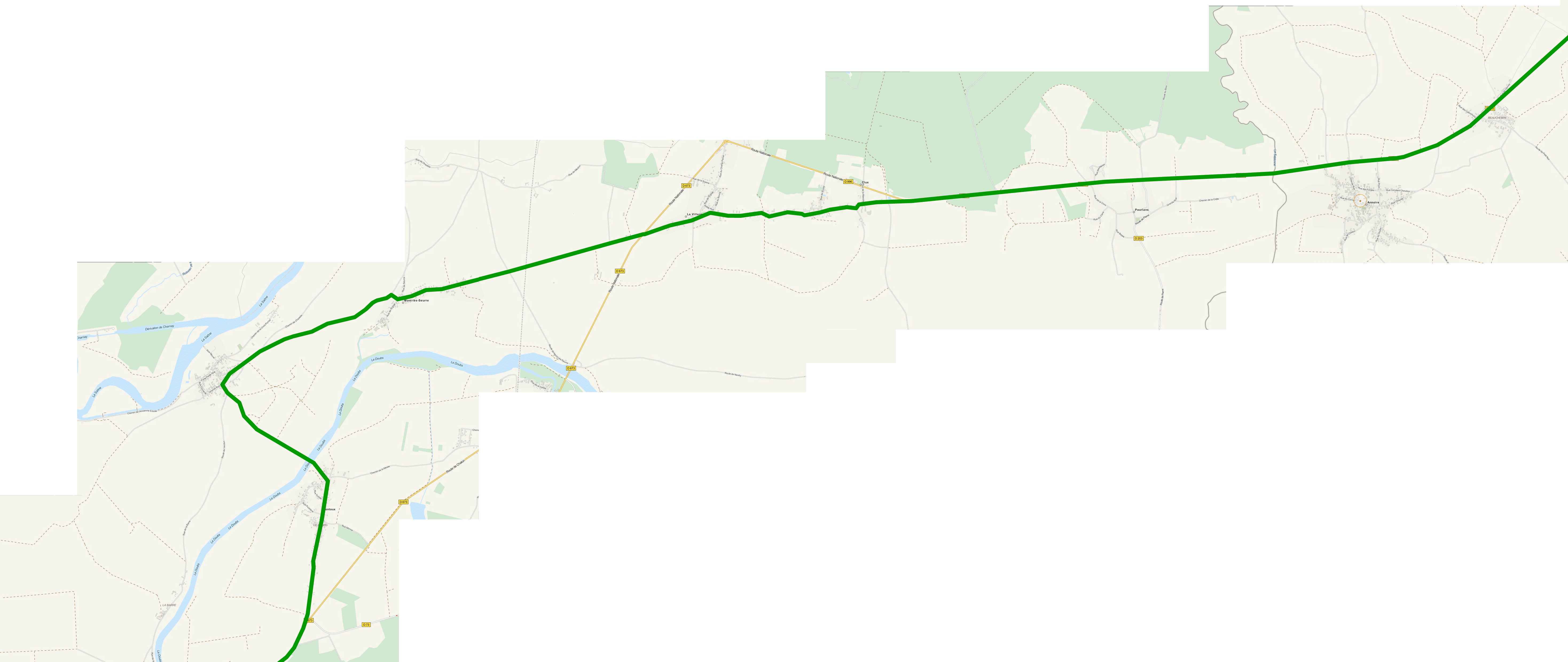 Detailkarte der Römerstrasse von Chalon-sur-Saône nach Besançon - Teilstück Pontoux bis Beauchemin Carte de détail de la voie romaine de Chalon-sur-Saône à Besançon - Partie de Pontoux à Beauchemin This map may be incomplete, and may contain errors. Don't rely solely on it for navigation.